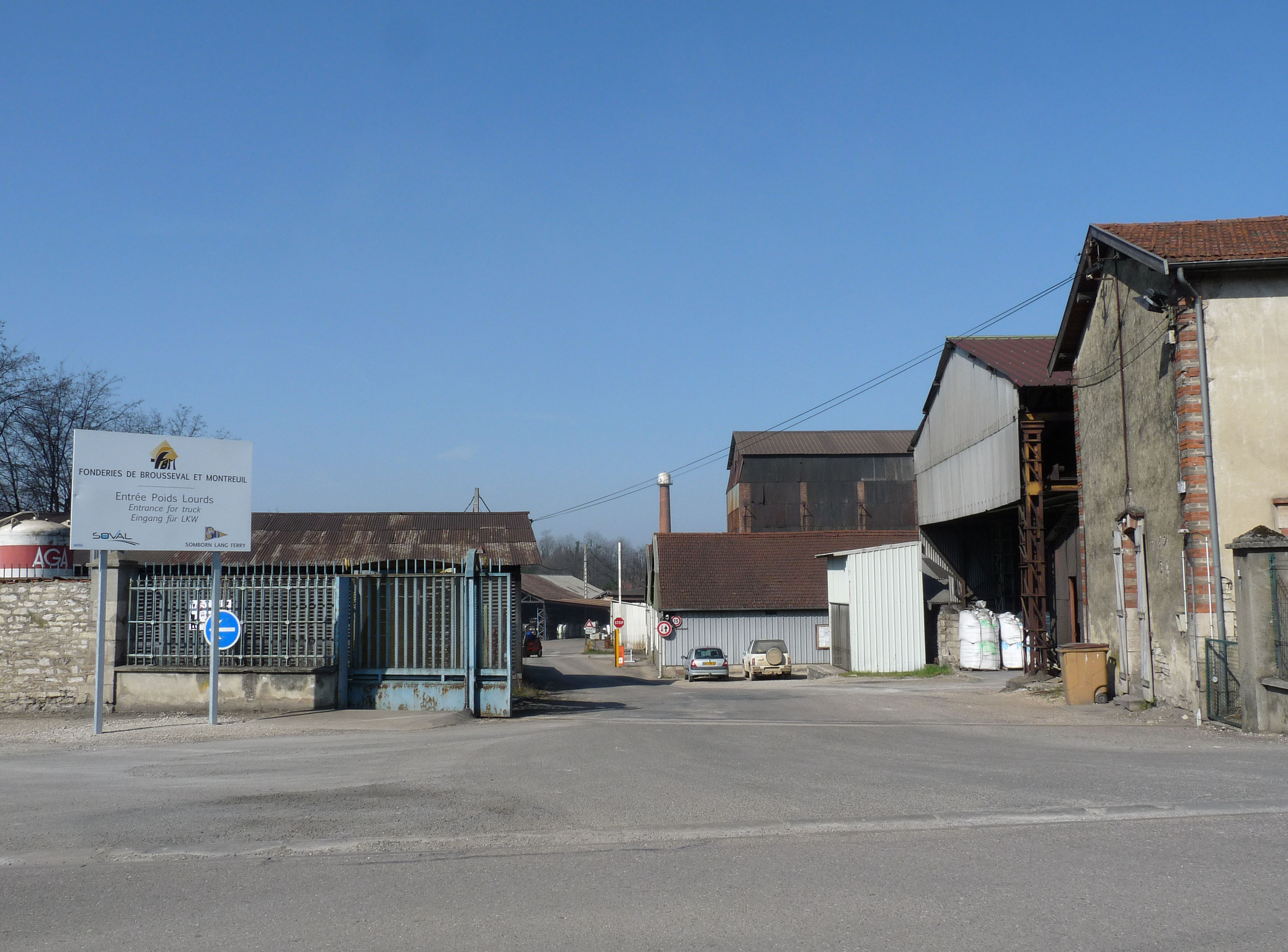 Fonderies à Brousseval (Haute-Marne)